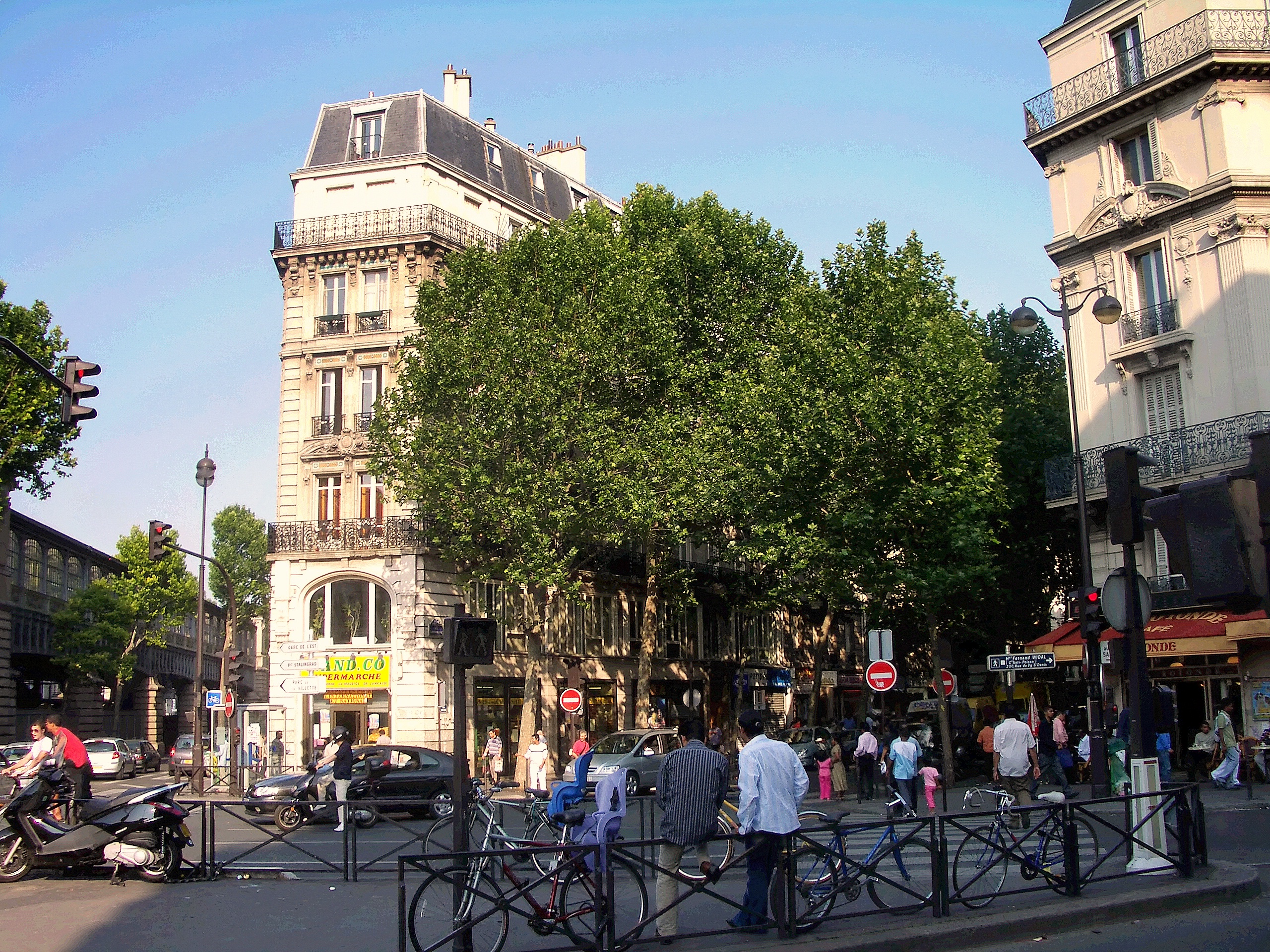 Vue du carrefour de la rue du faubourg saint-denis, rue louis blanc, boulevard de la chapelle (regardant vers l'est) dans le dans le 10e. Prise le 14 juillet 2006 ; modifiée dans Picasa pour régler le contraste, etc.